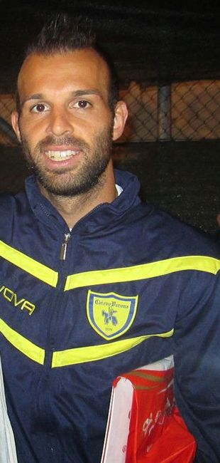 Meggiorini nel 2014